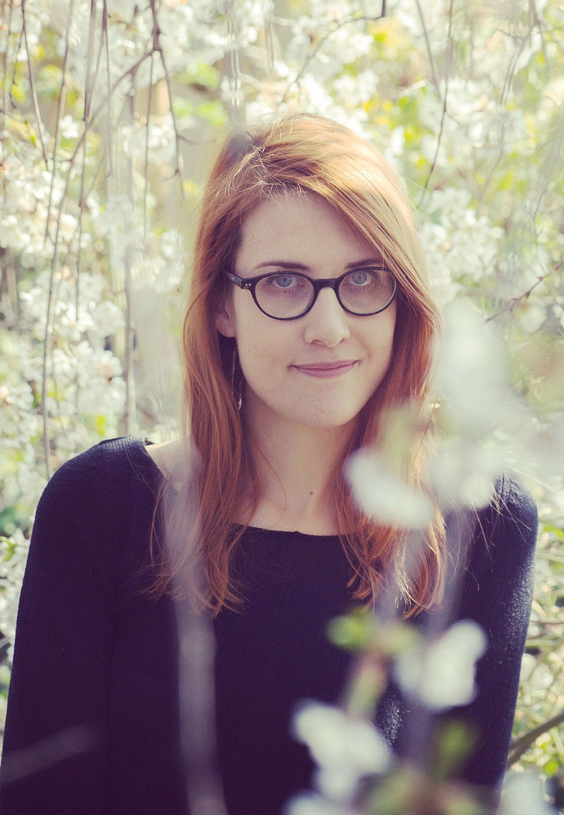 Autorenporträt Jana Volkmann (c) Jorghi Poll (Edition Atelier)